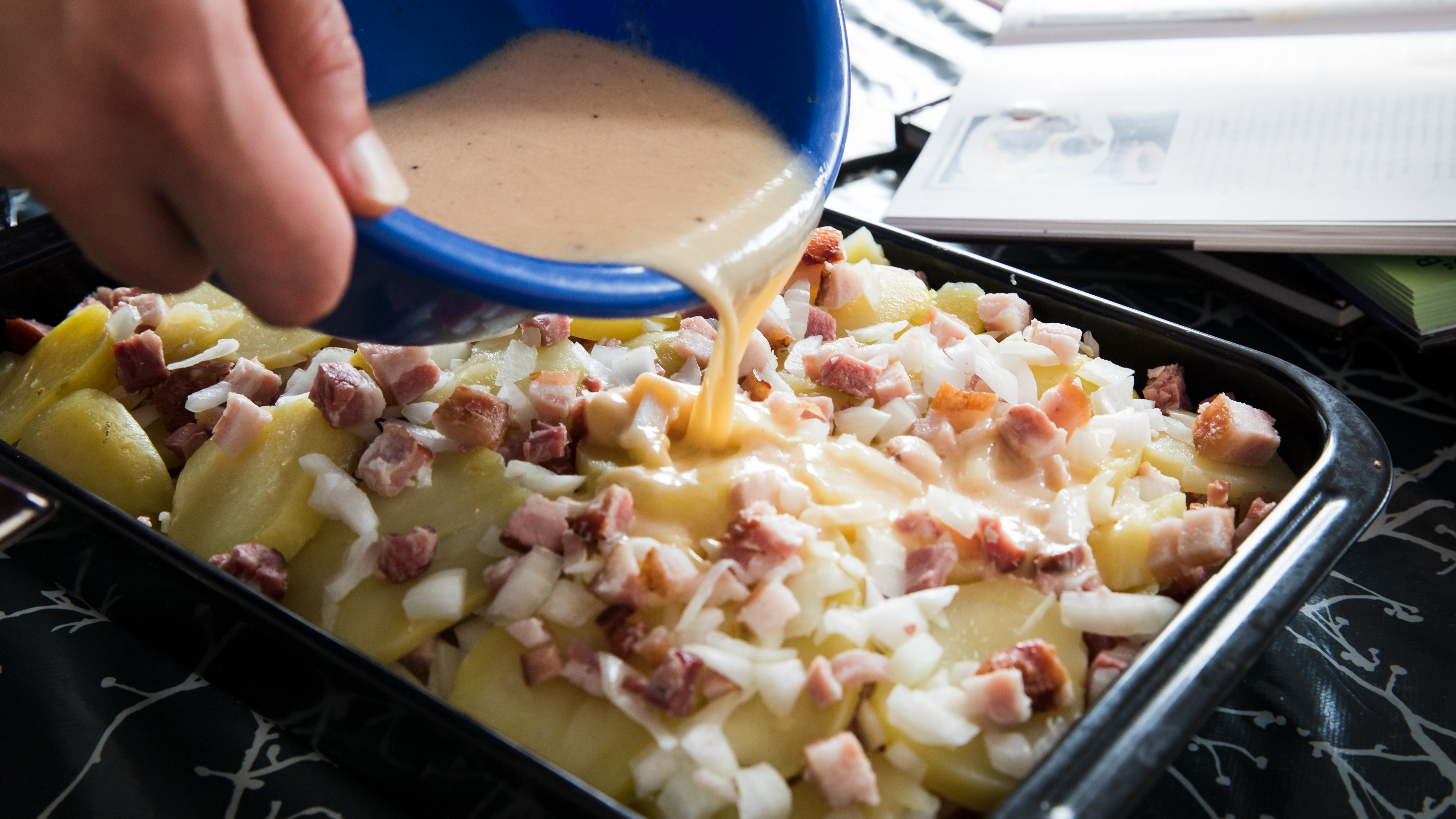 Zubereitung „Schinkenbegräbnis“ in der Auflaufform: Auf die abwechelnd geschichteten Zutaten (Pellkartoffeln, gekochter Schinkenspeck, Zwiebeln) wird eine Mischung aus Eiern, Sahne, der Schinkenbrühe und Gewürzen gegossen.